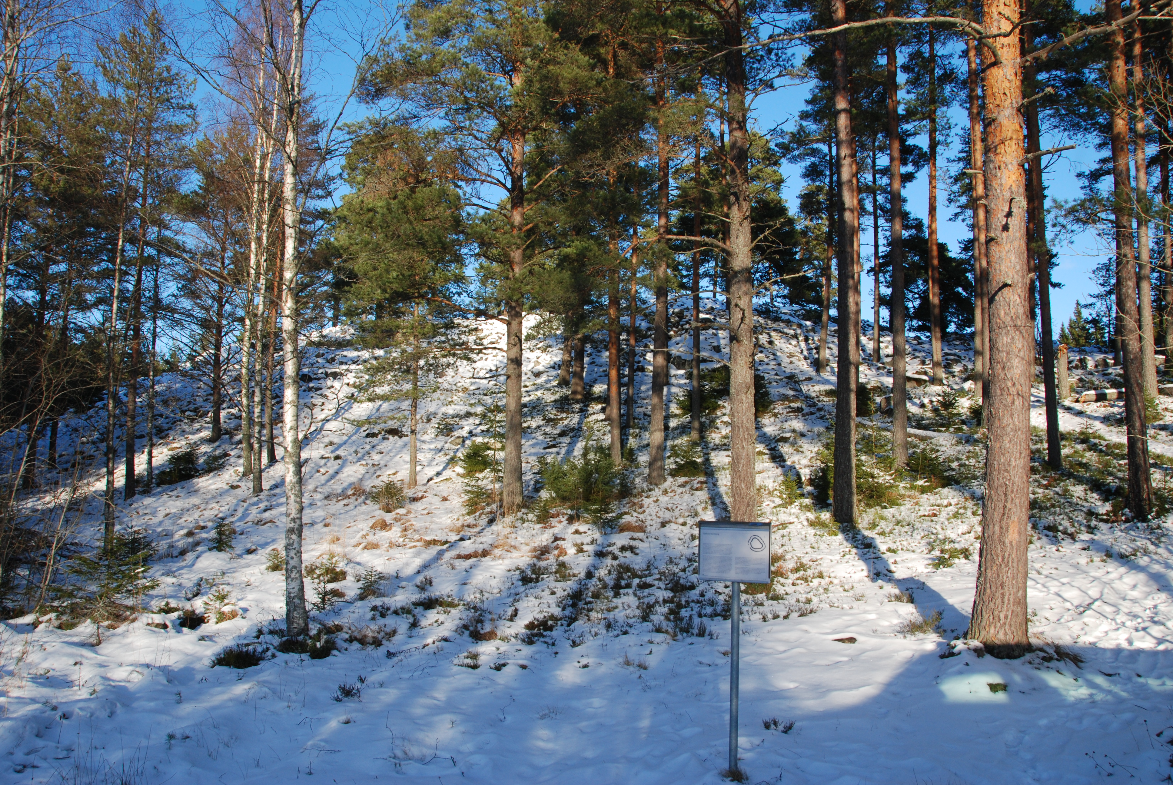 Salsta borg (Lena 12:1)